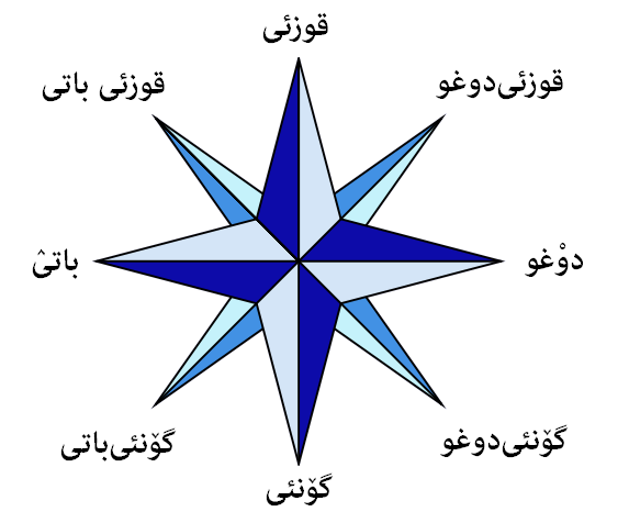 تۆرکجه: جغرافی یؤنلری